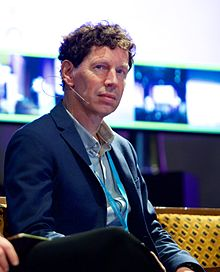 Frank van Harmelen alla Conferenza Open Innovation 2.0 del 2016